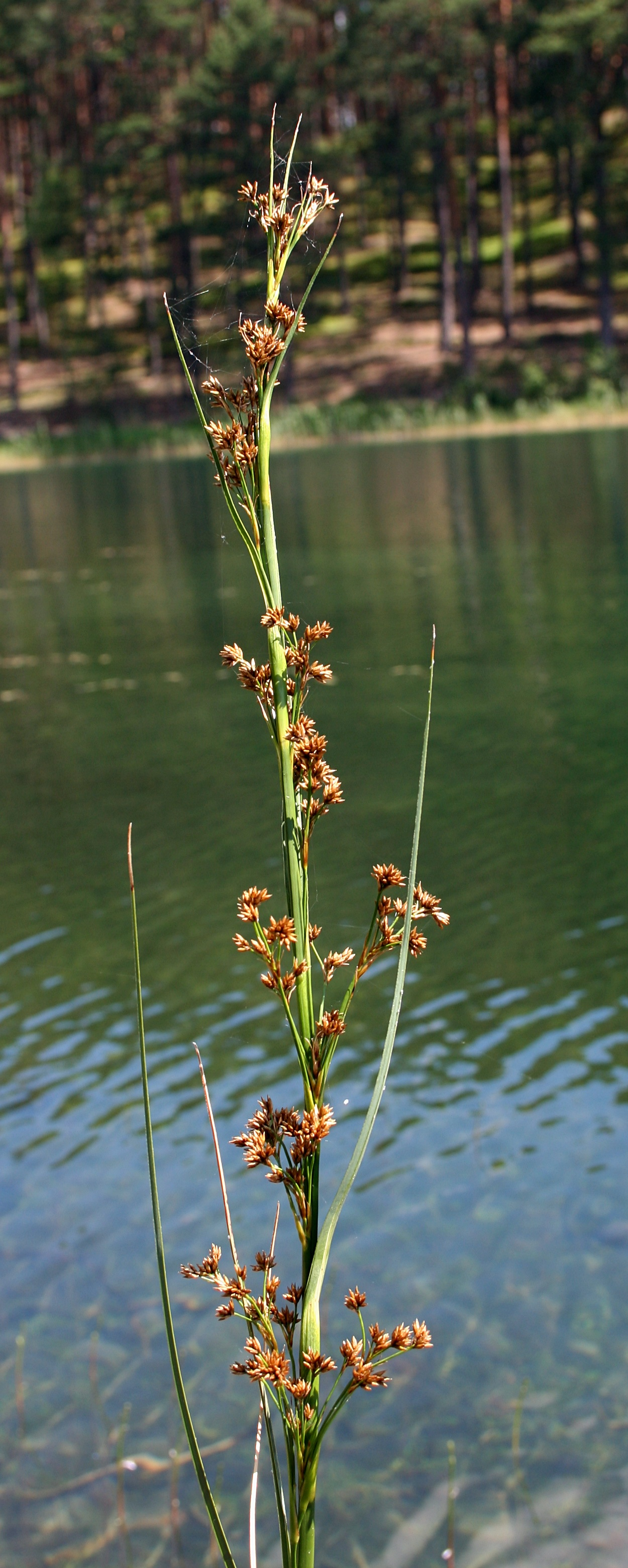 Zaborski Park Krajobrazowy, wiecha kłoci wiechowatej